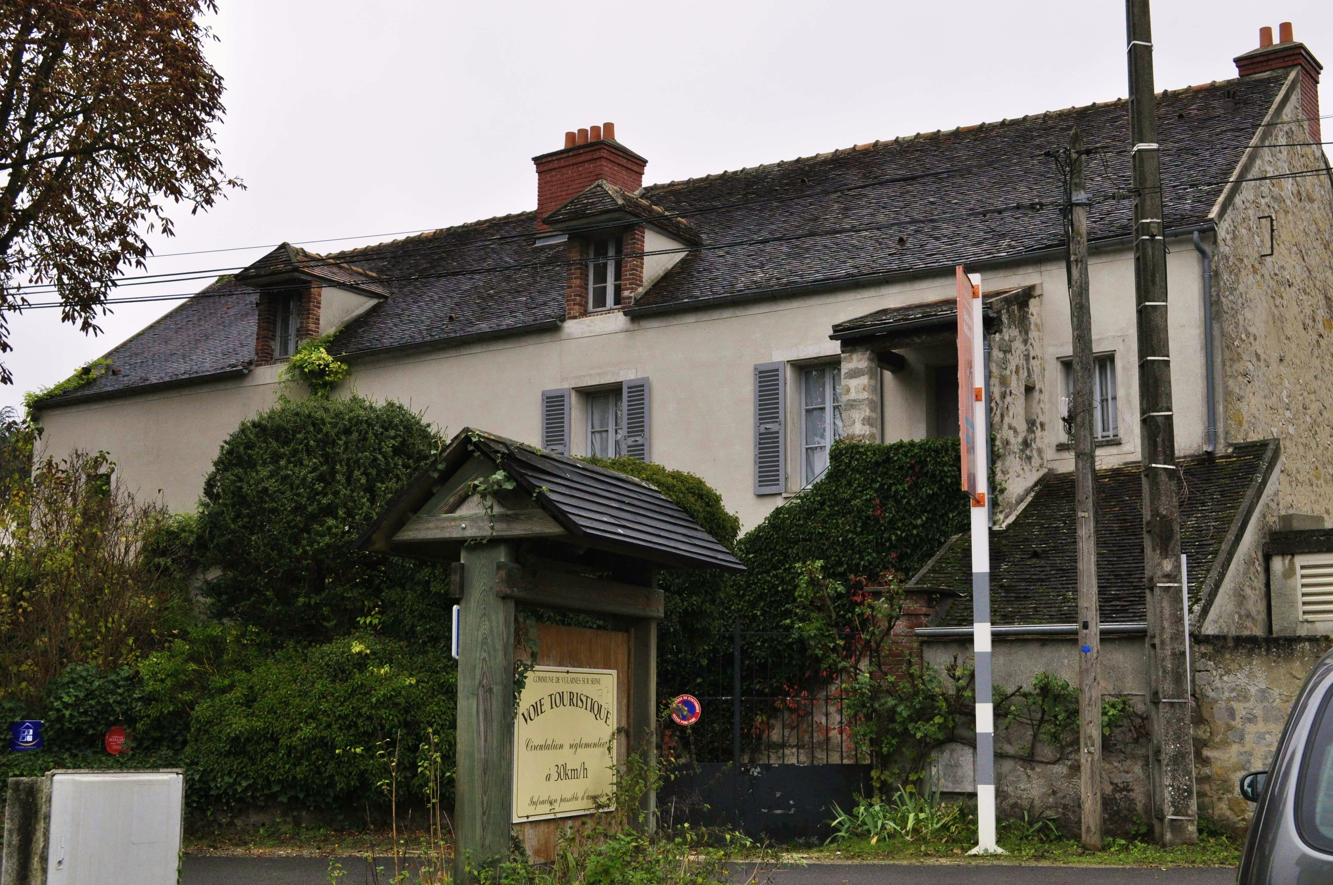 Vulaines-sur-Seine, Musée départemental Stéphane Mallarmé, vue d'ensemble.